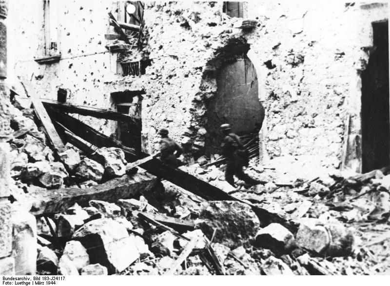 Scherl Bilderdienst In den Trümmern von Cassino Auch kleinste Wege von Haus zu Haus, von Deckung zu Deckung, können von unseren heldenmütigen Fallschirmjägern nur im Sprung zurückgelegt werden, denn jede Bewegung in der heiss umkämpften Stadt fordert unvermeidlich das Feuer des Feindes heraus, der mit Artillerie auch auf den einzelnen Mann schiesst. PK-Kriegsberichter Luethge 1.4.1944 [Herausgabedatum]